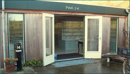 Schelpenmuseum Paal 14 Schiermonnikoog